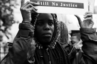 Fotografie Patrika Jandaka; Patrik Jandak´s photographs Neměňte rozlišení. Don´t change resolution!